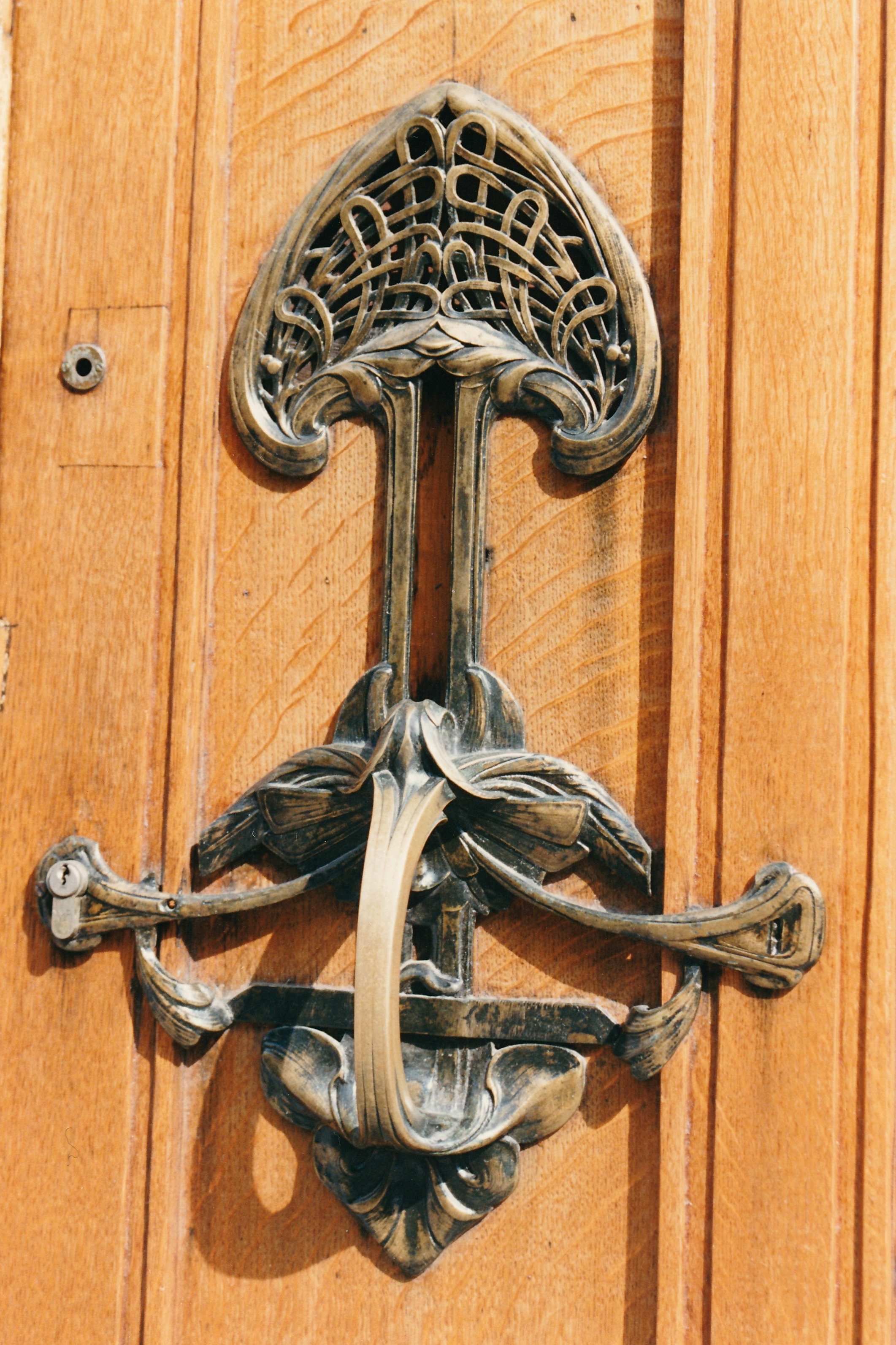 Belgique - Bruxelles - Maison-atelier du sculpteur Fernand Dubois (Art nouveau, architecte Victor Horta, 1901)